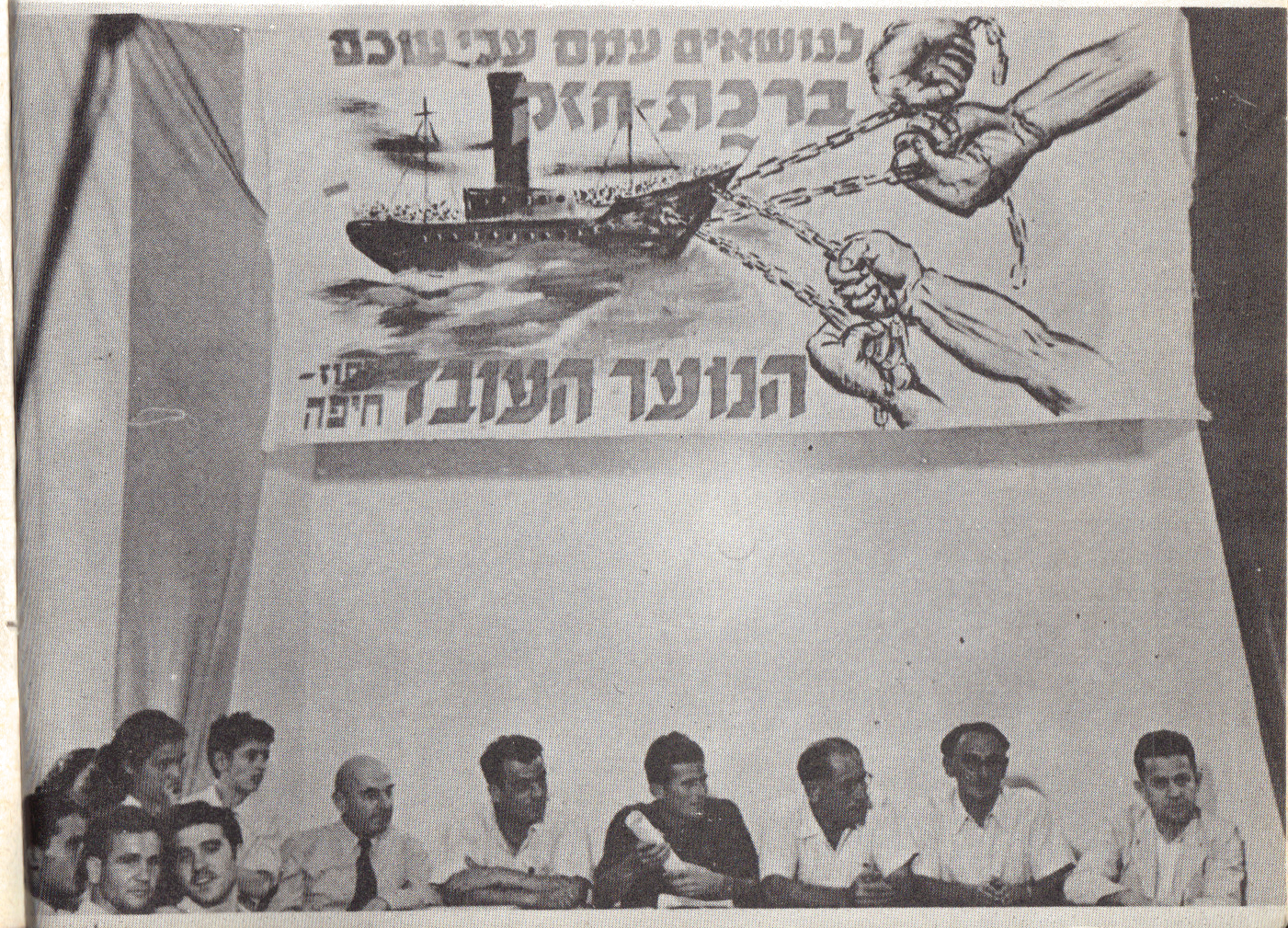 הכיתוב בתנועה "הנוער העובד", ממקם את התמונה ללפני שנת 1959 שבה התאחד הנועד העובד עם התנועה המאוחדת ונקרא "הנוער העובד והלומד".